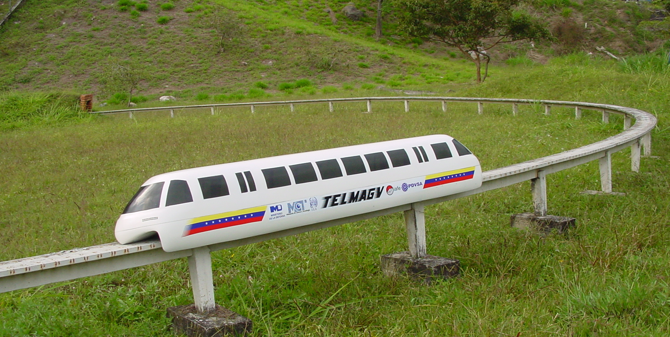 Telmag